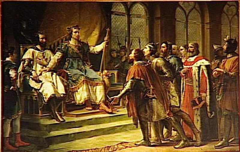 Saint Louis médiateur entre le roi d'Angleterre et ses barons. 23 janvier 1264. Musée national des châteaux de Versailles et de Trianon